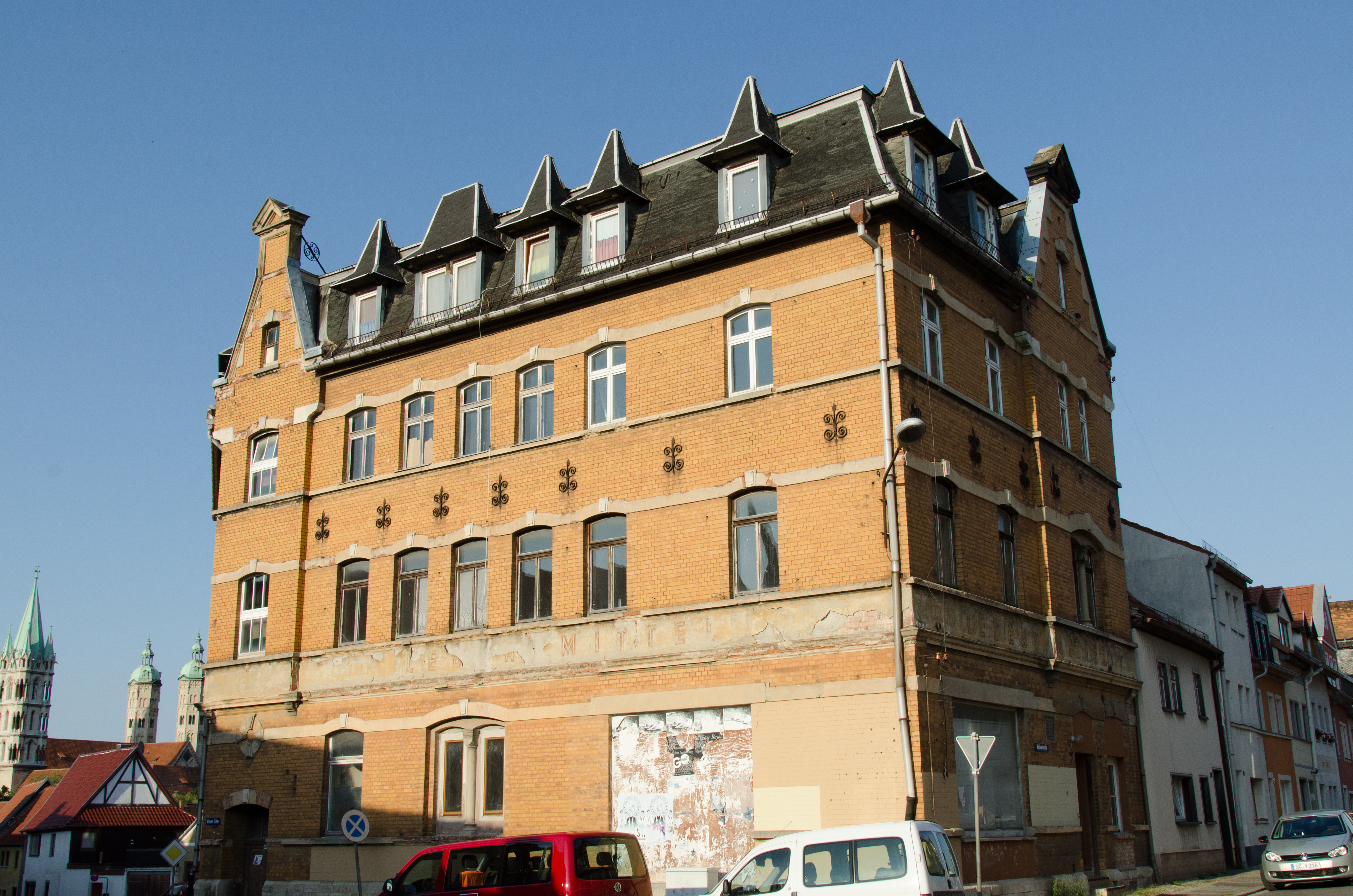 Naumburg, Michaelisstraße 40